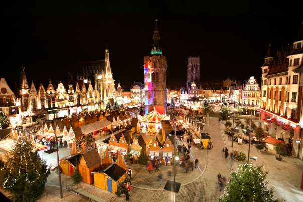 Place du beffroi Pendant Noel